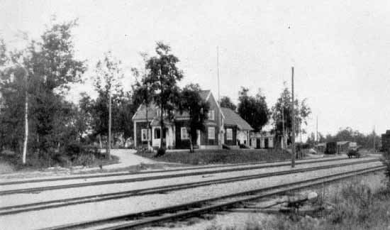 Älghultsby railway station on Ruda-Älghults Järnväg and Östra Värends Järnväg